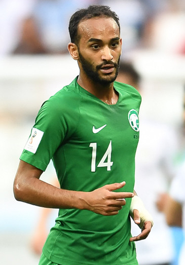 Египет с Салахом проиграл Саудовской Аравии